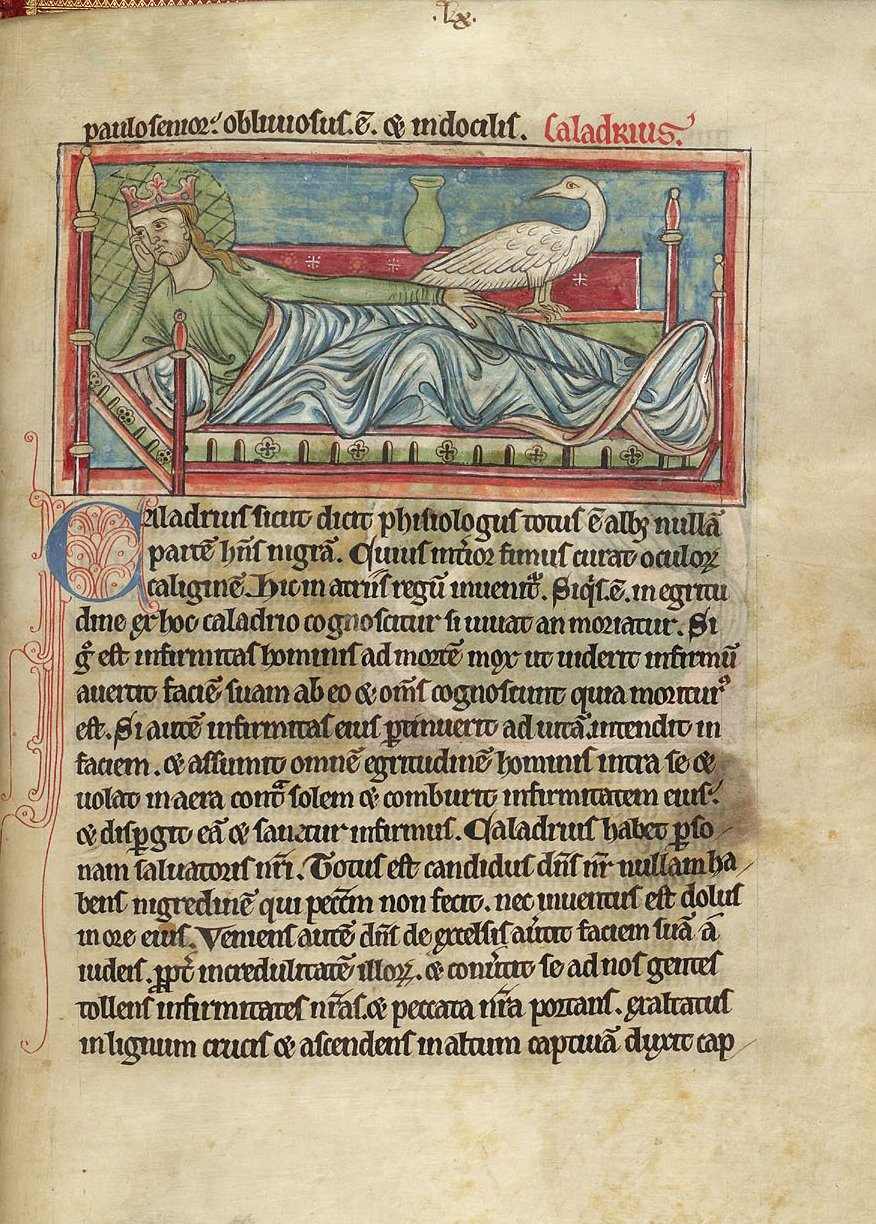 Caladrius